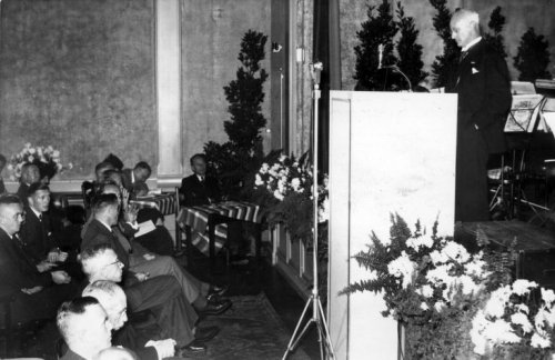 In Pulchri studio is hedenavond de openingsbijeenkomst der tweede winterhulpactie gehouden, waarbij het woord werd gevoerd door den Secretaris-Generaal van het Departement van Binnenlandsche Zaken, Mr. K.J. Frederiks. De Directeur-Generaal van Winterhulp Nederland opent de tweede winterhulp actie voor geheel Nederland. Amsterdam, 15 oktober 1941.